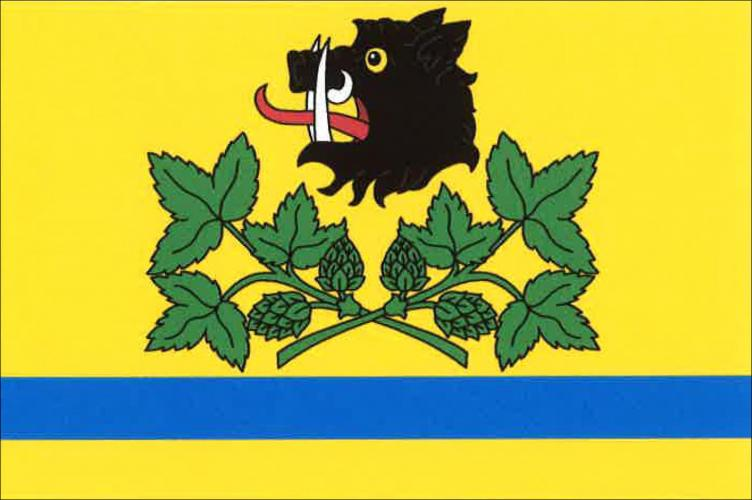 Radovesice vlajka